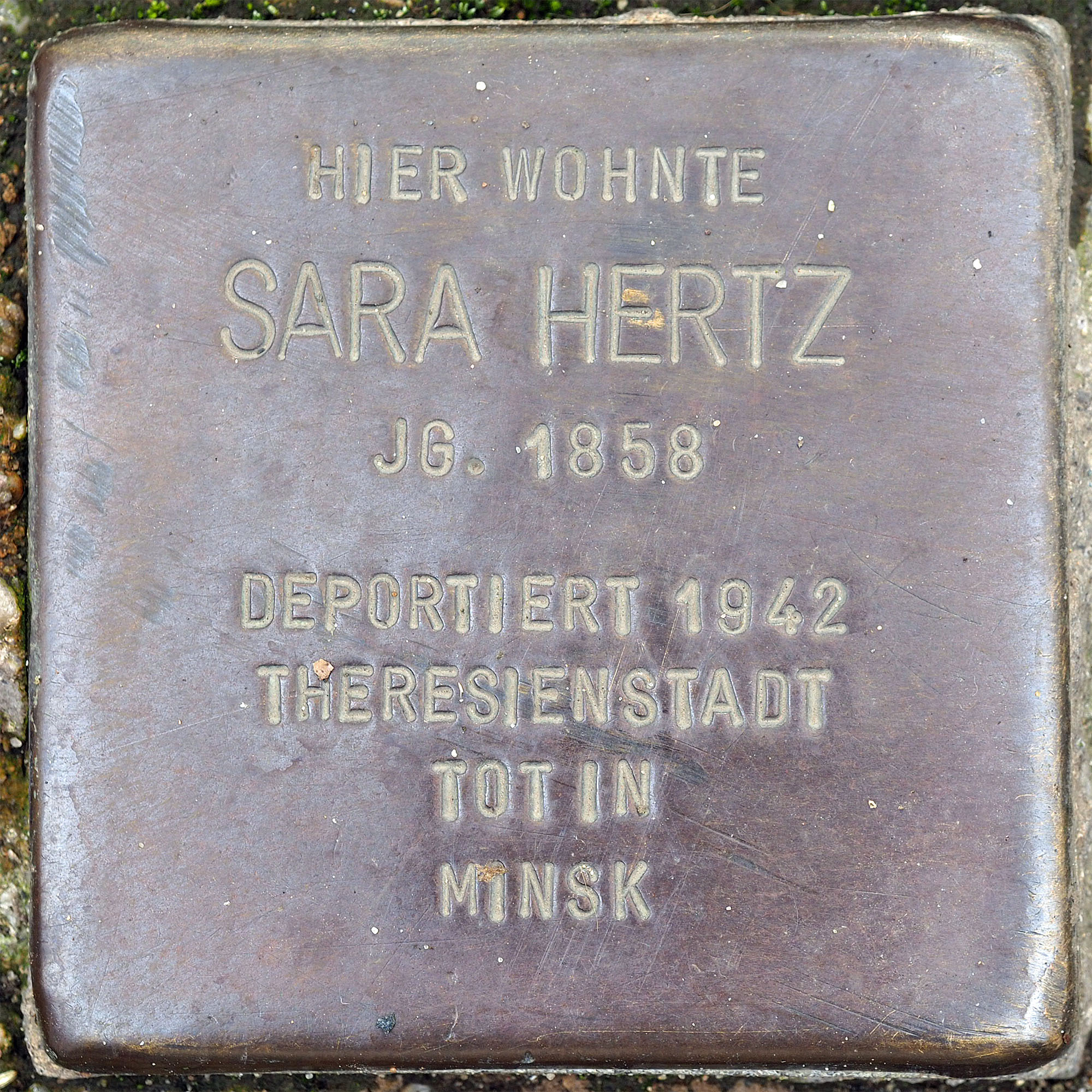 Stolpersteine MG: Hertz, Sara